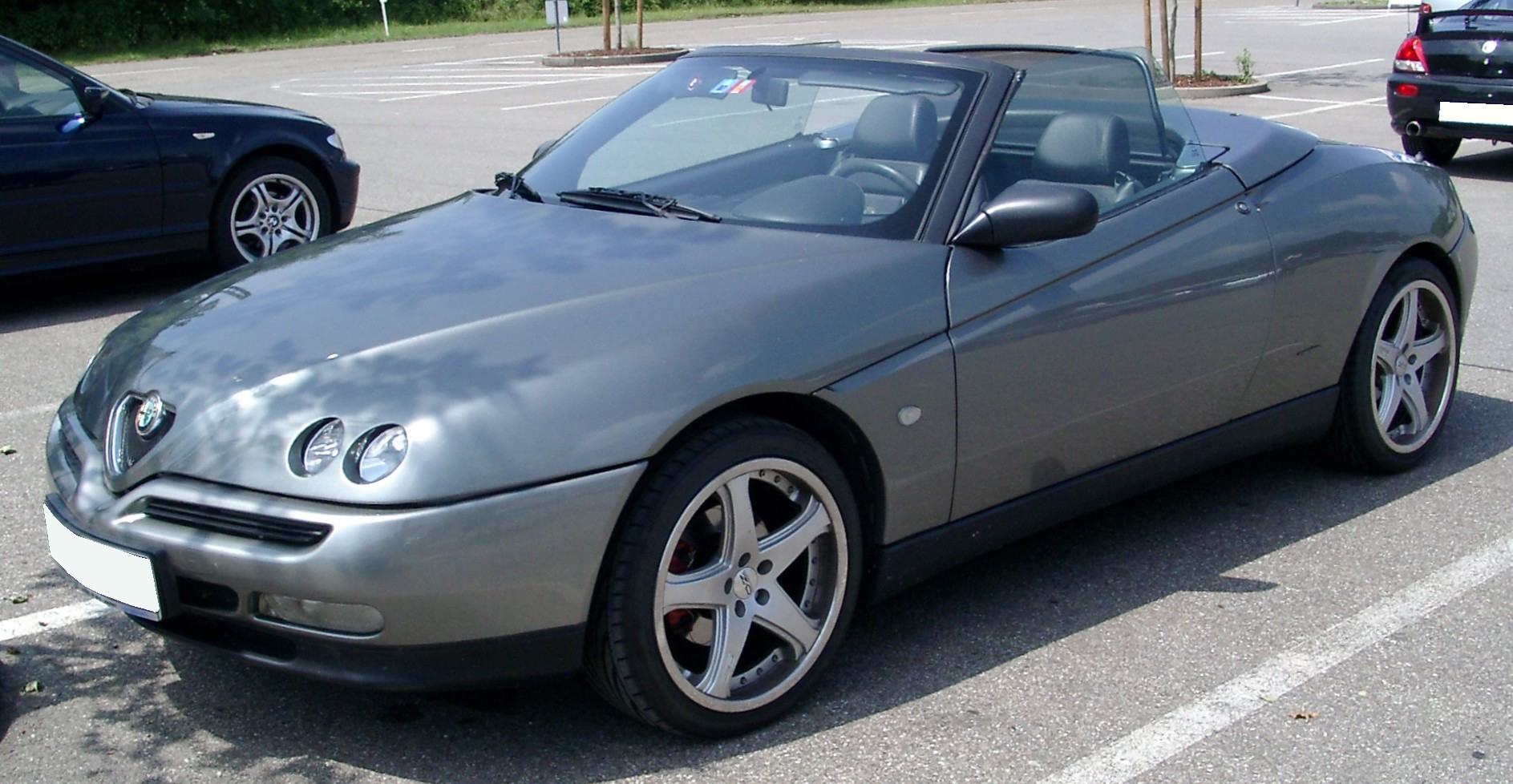 Alfa Romeo Spider, 5. Generation